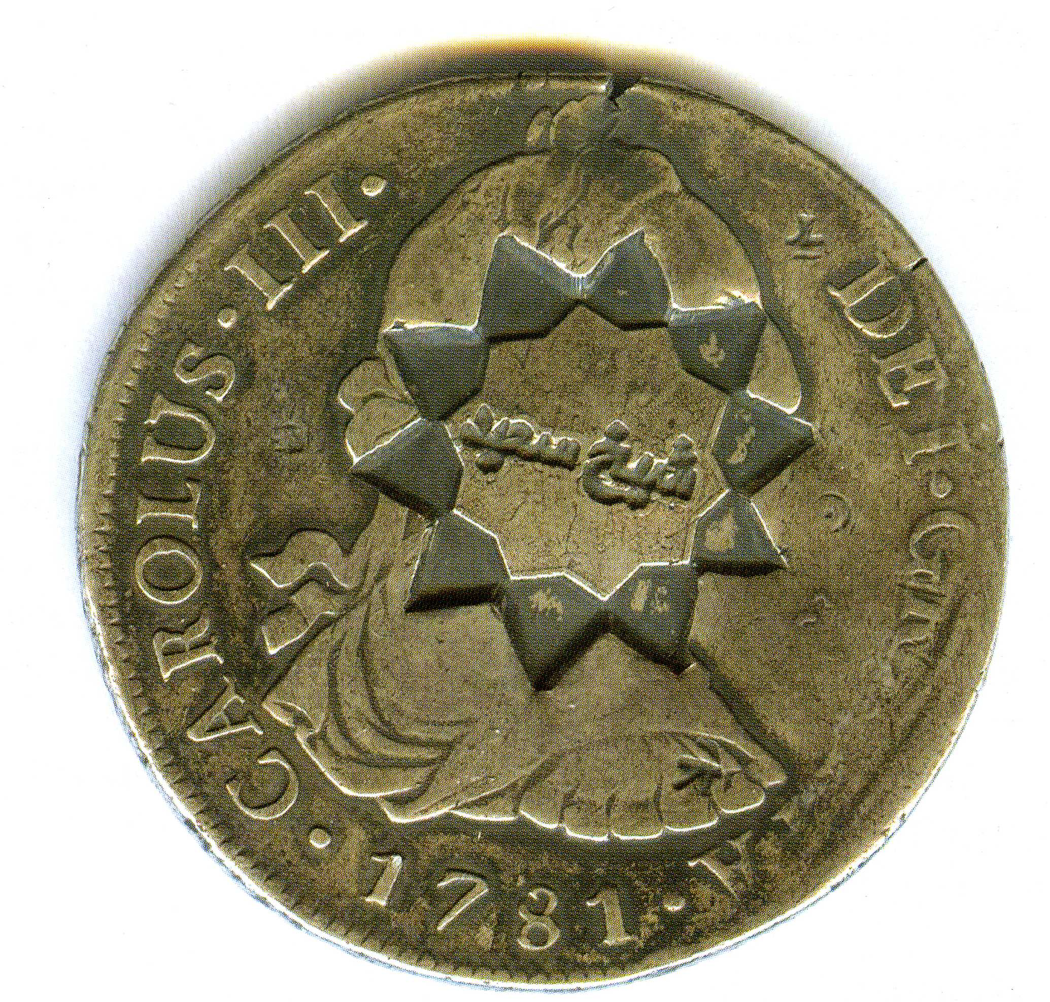 Moneda de 8 reales española empleada en Cheick Said